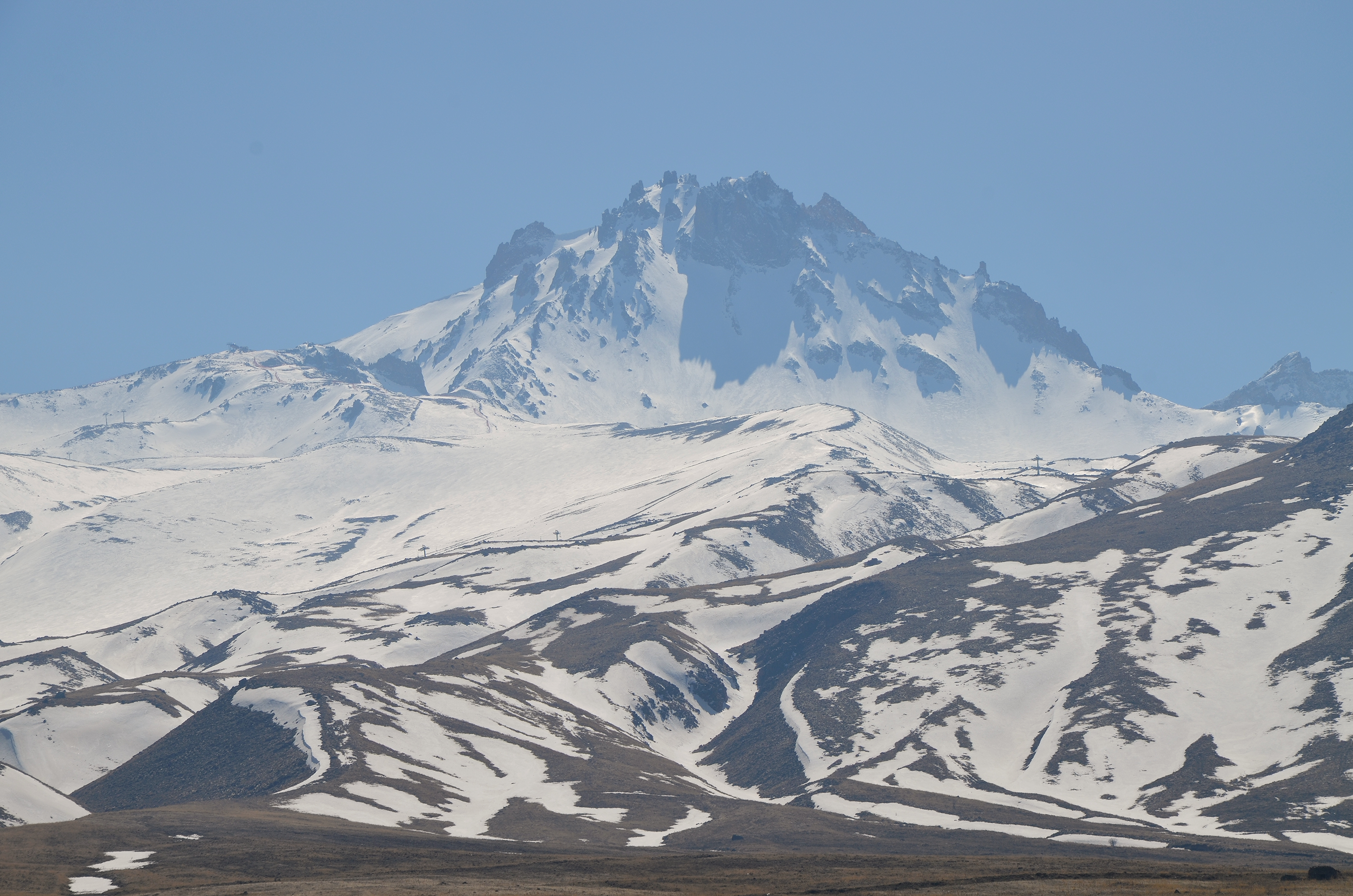 Mount Erciyes (Argaeus), Turkey